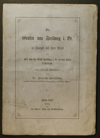 Dissertationsheft Heinrich Hansjakob: Die Grafen von Freiburg i.B., Vorderseite